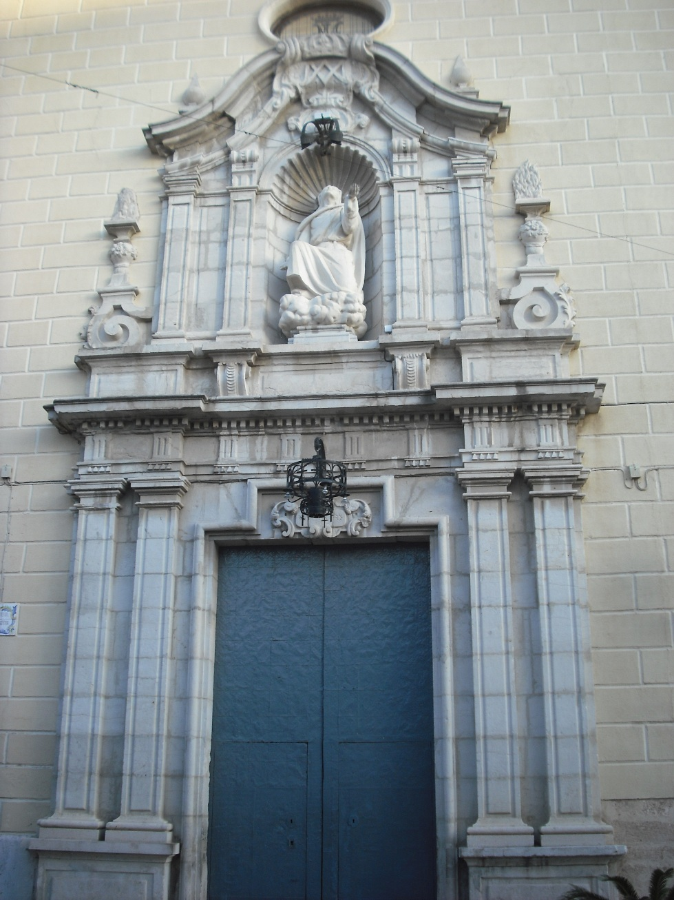 Puerta de la Iglesia de Alboraya